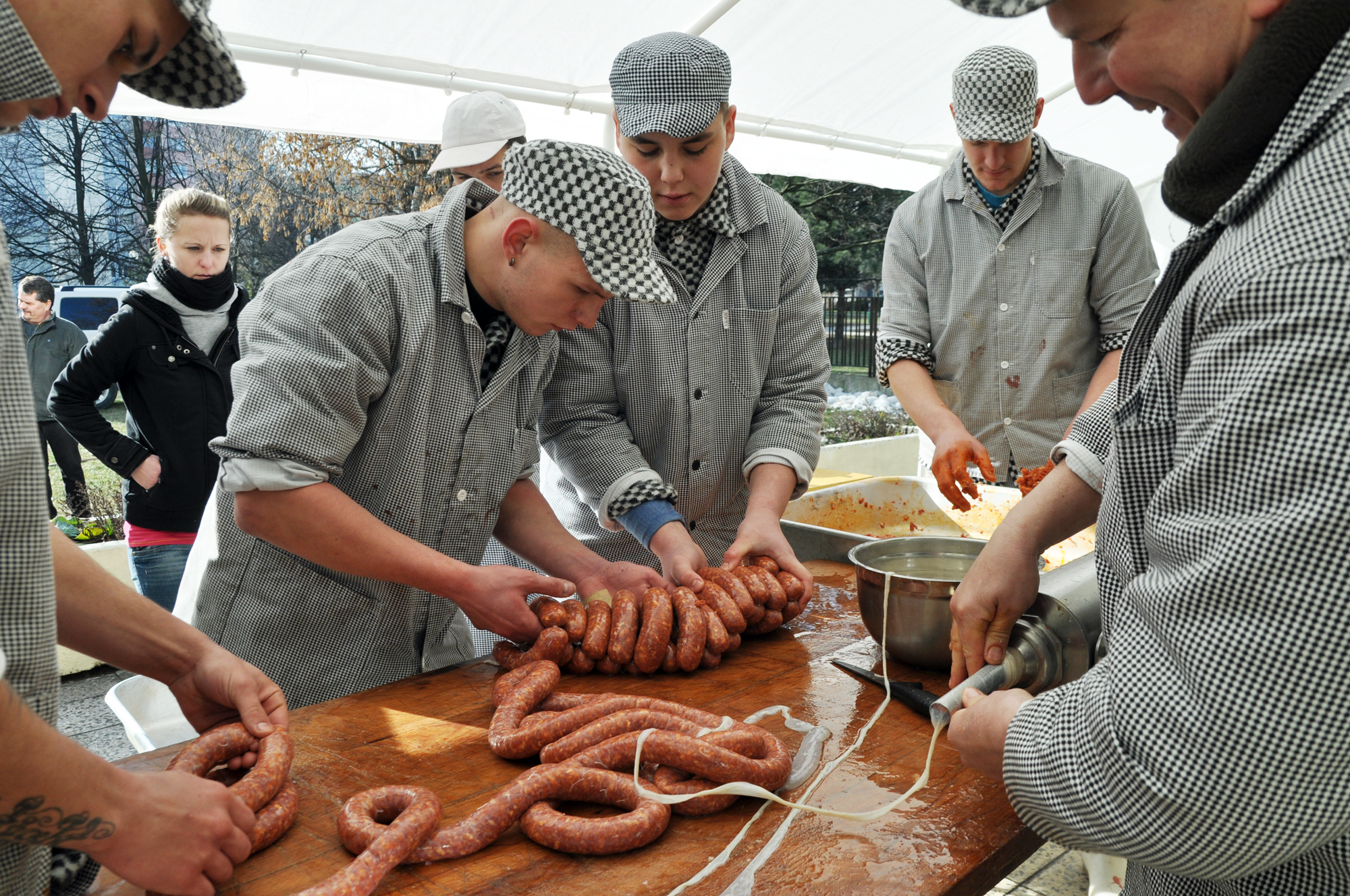 Fašiangová zabíjačka 2013